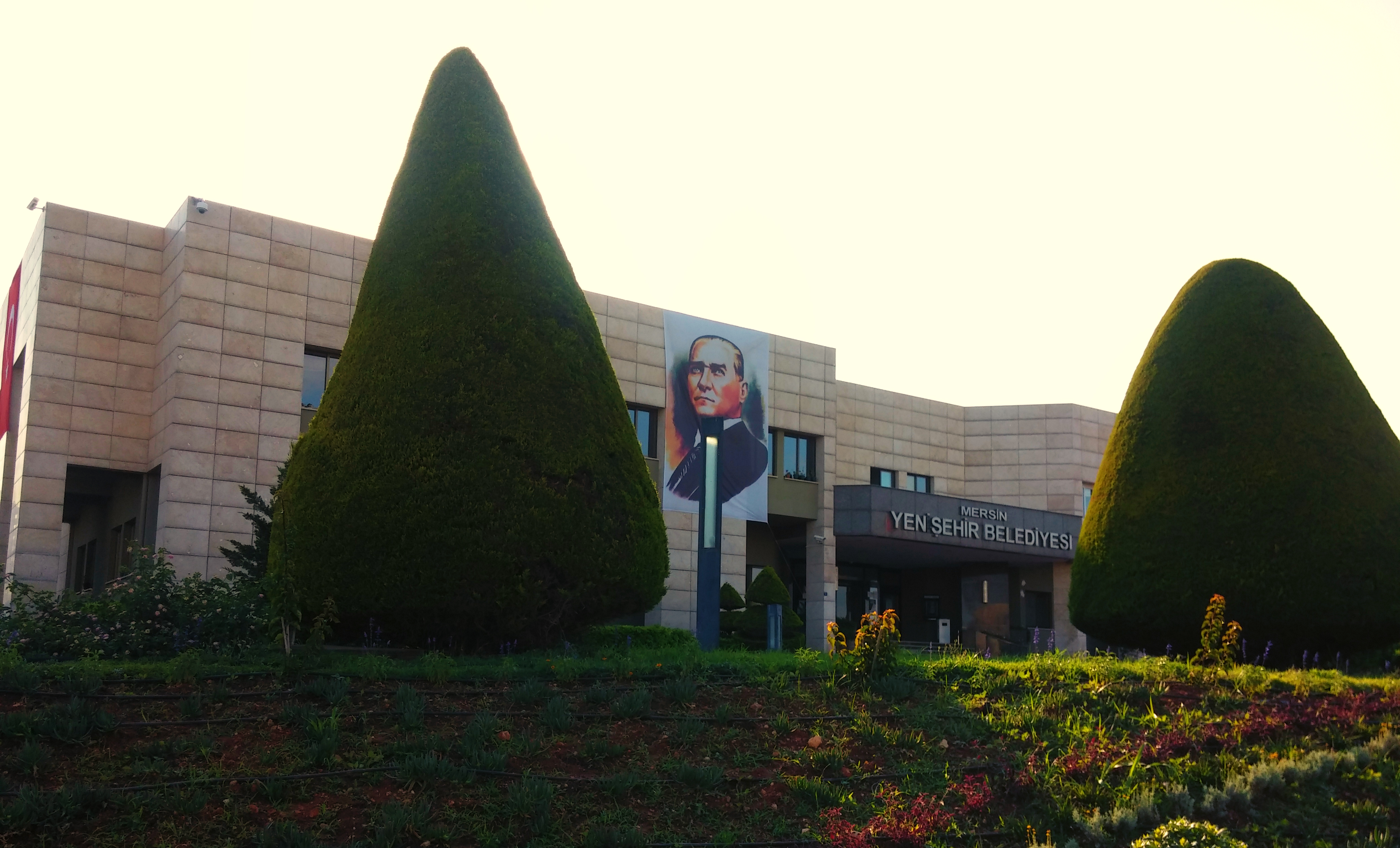 Mersin Yenişehir Belediyesi hizmet binası.